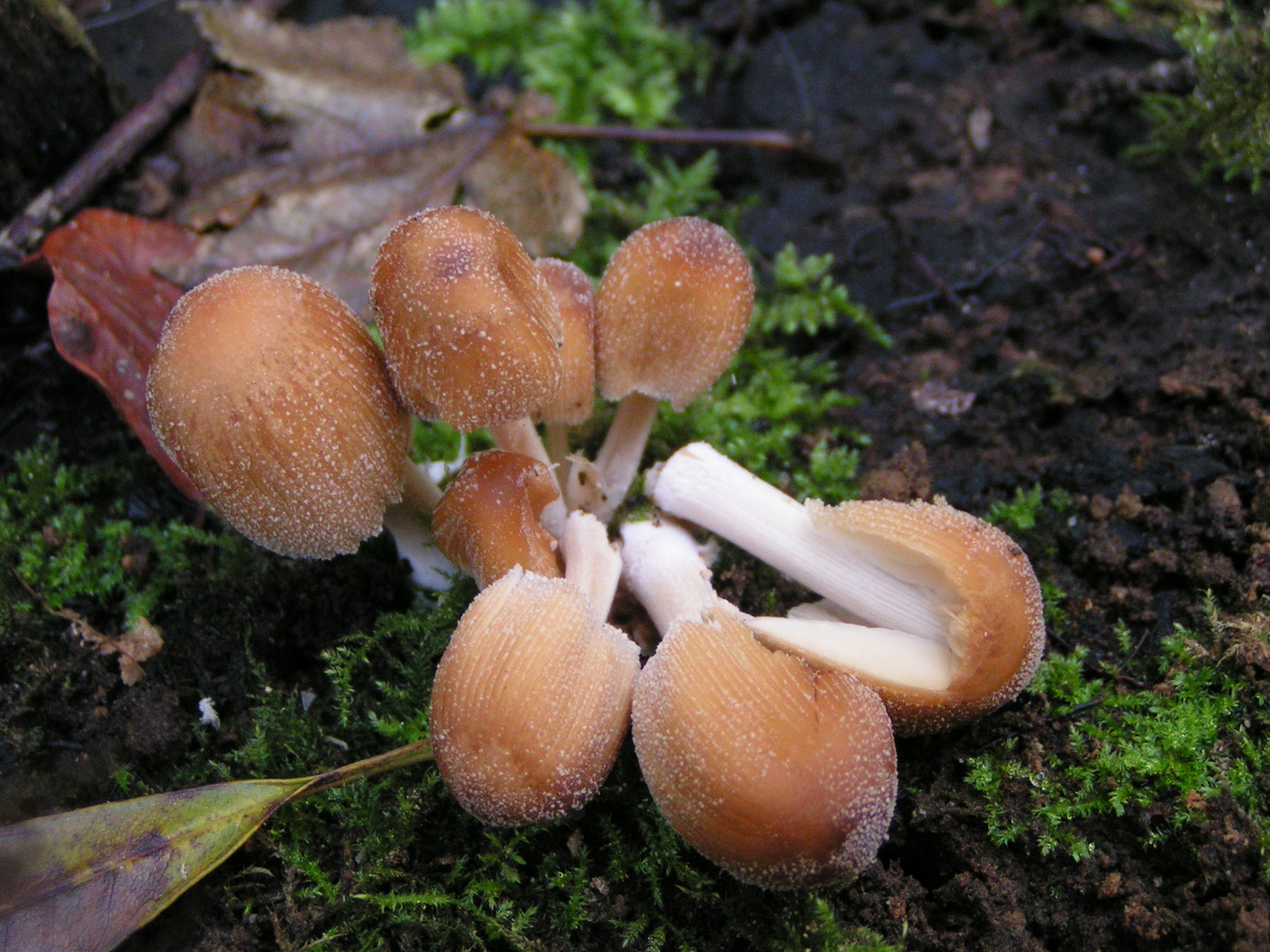 Coprinus micaceus01